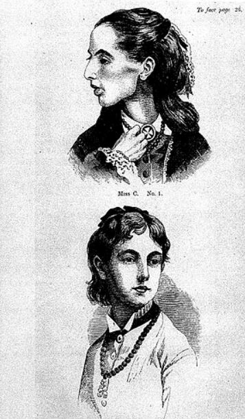 Anorexie mentale apparaissant chez une jeune adolescente. Croquis et gravure figurant l'avant et l'après et les conséquences de trouble alimentaire. 1874.